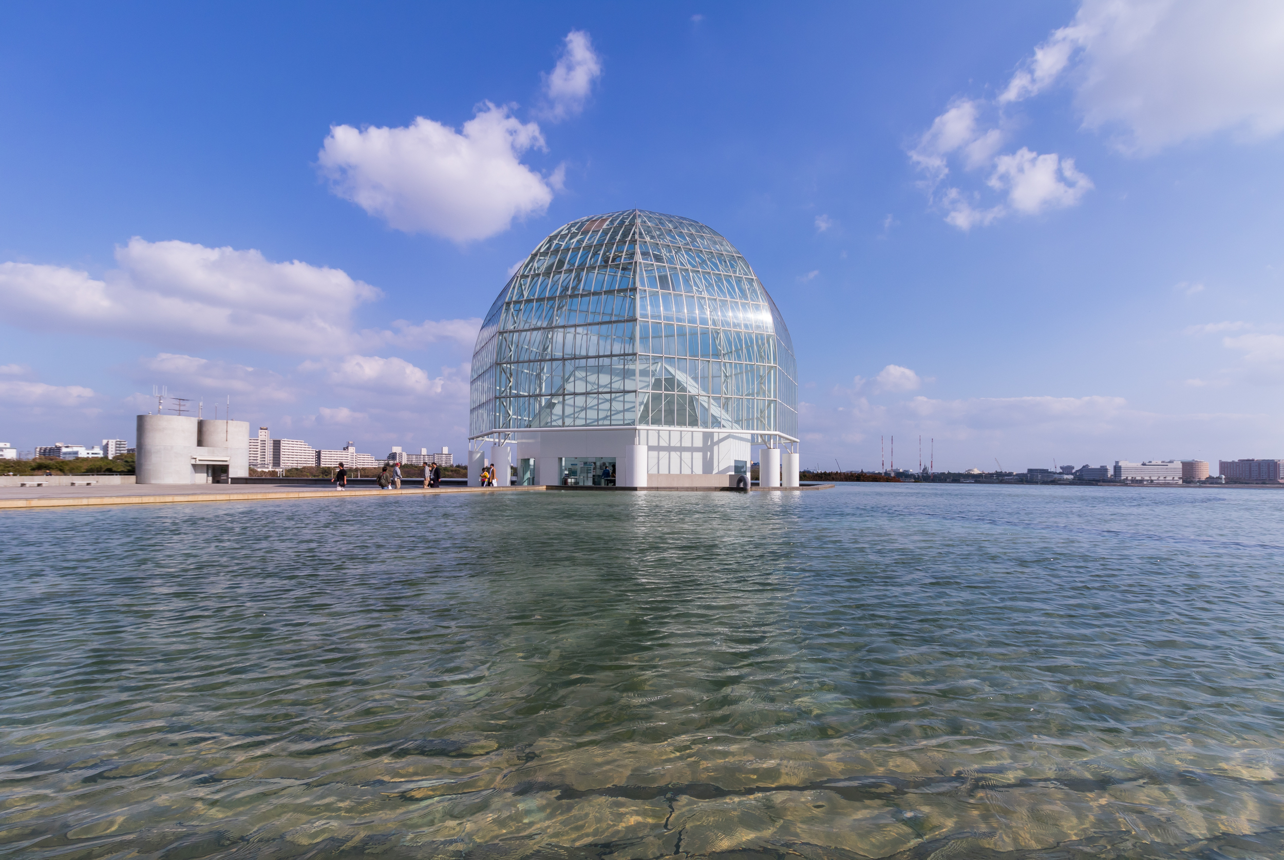 葛西臨海公園内・葛西臨海水族園（東京都江戸川区）。谷口吉生設計（1989）